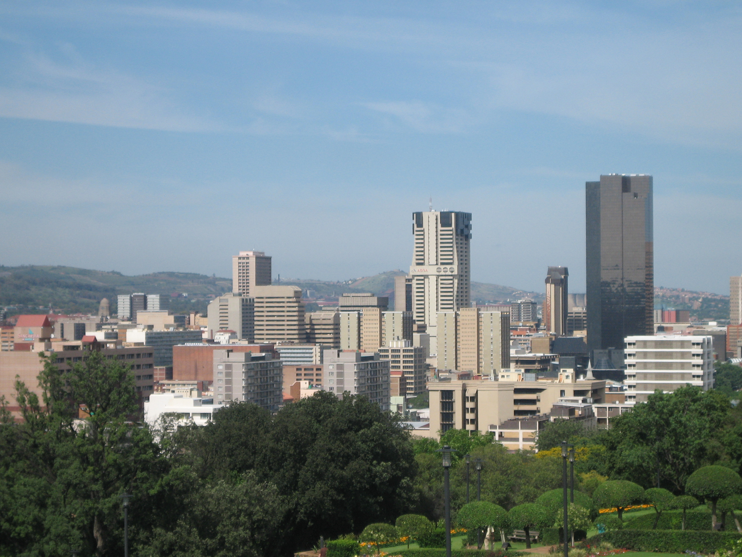 Prétoria